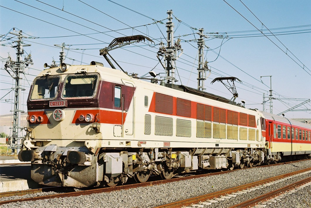 Locomotive E 1253 à Sidi-Kacem en tête du train 12TL Oujda-Casablanca